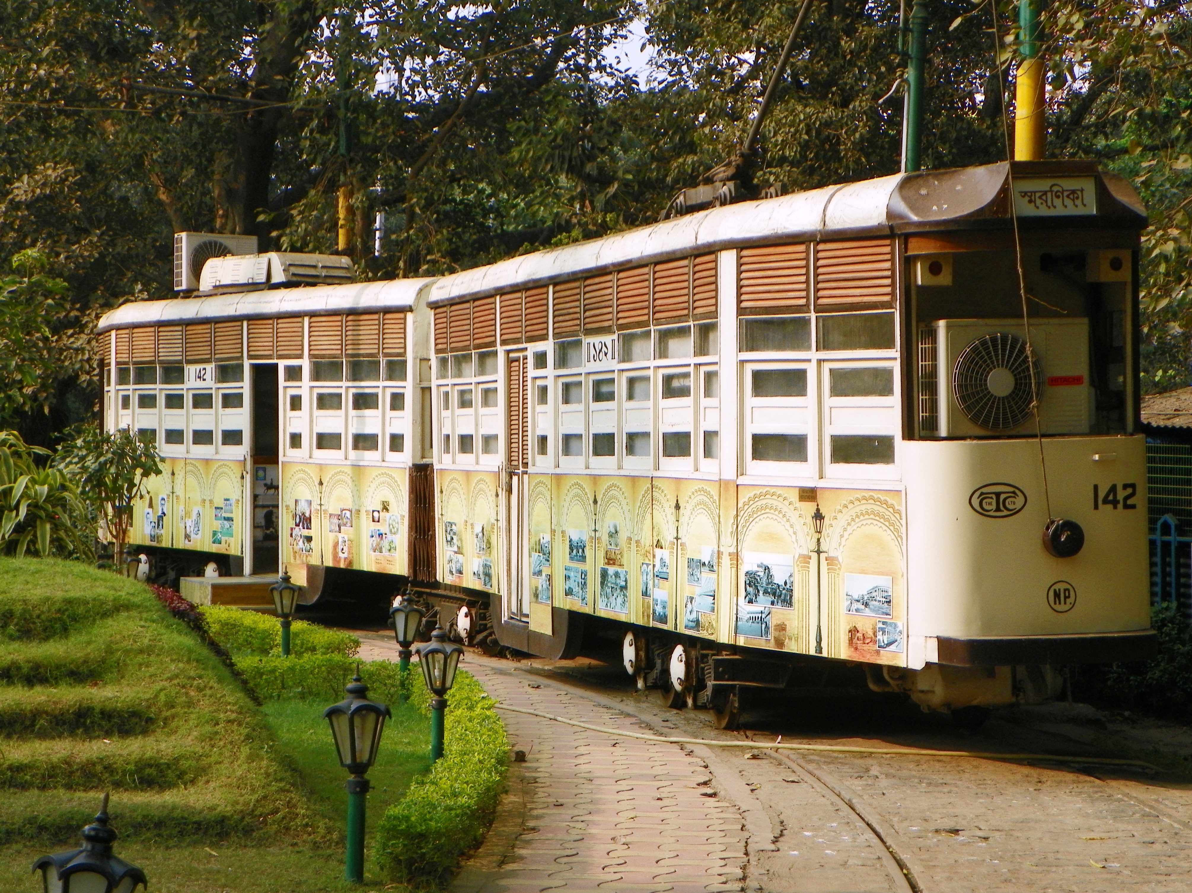 Kolkata 22, Smaranika (memorablia) - a mobile museum tram